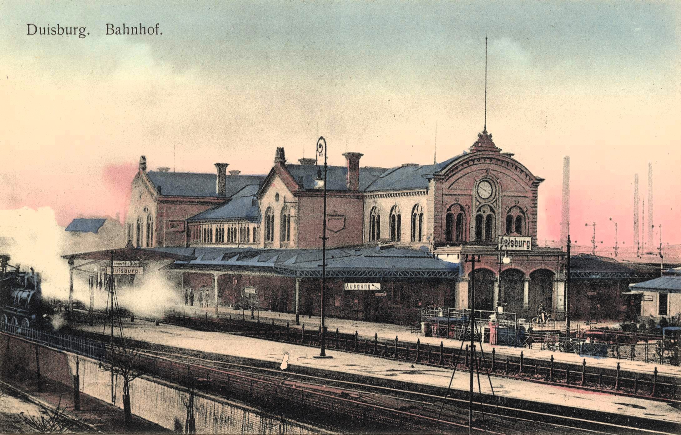 Historische Postkarte von Duisburg